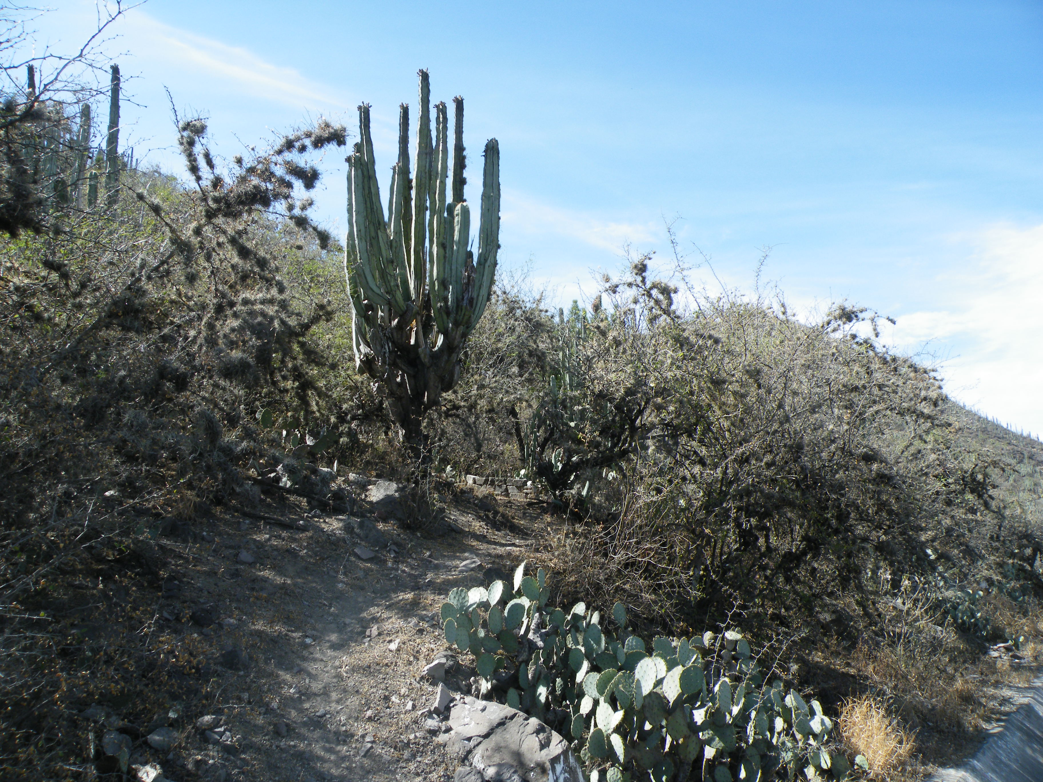 Near Rio Venados, Hidalgo